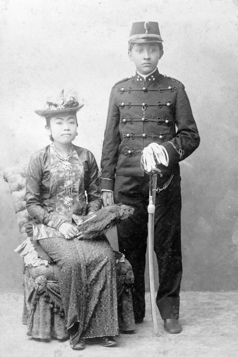 Foto. Vorstelijk echtpaar Kangdjeng Pangeran Angabei Sakalijan met echtgenote.